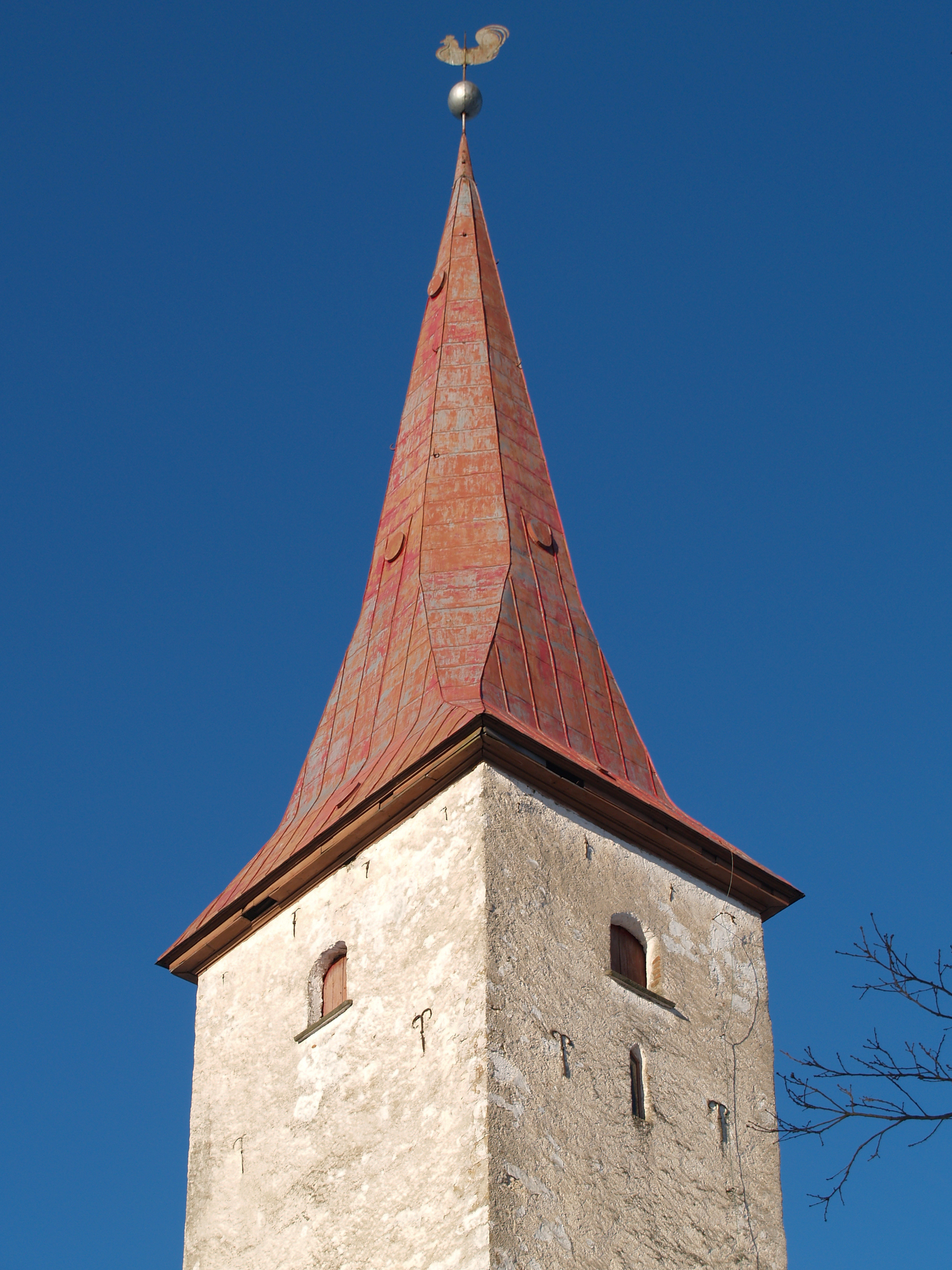 Suure-Jaani kiriku torn